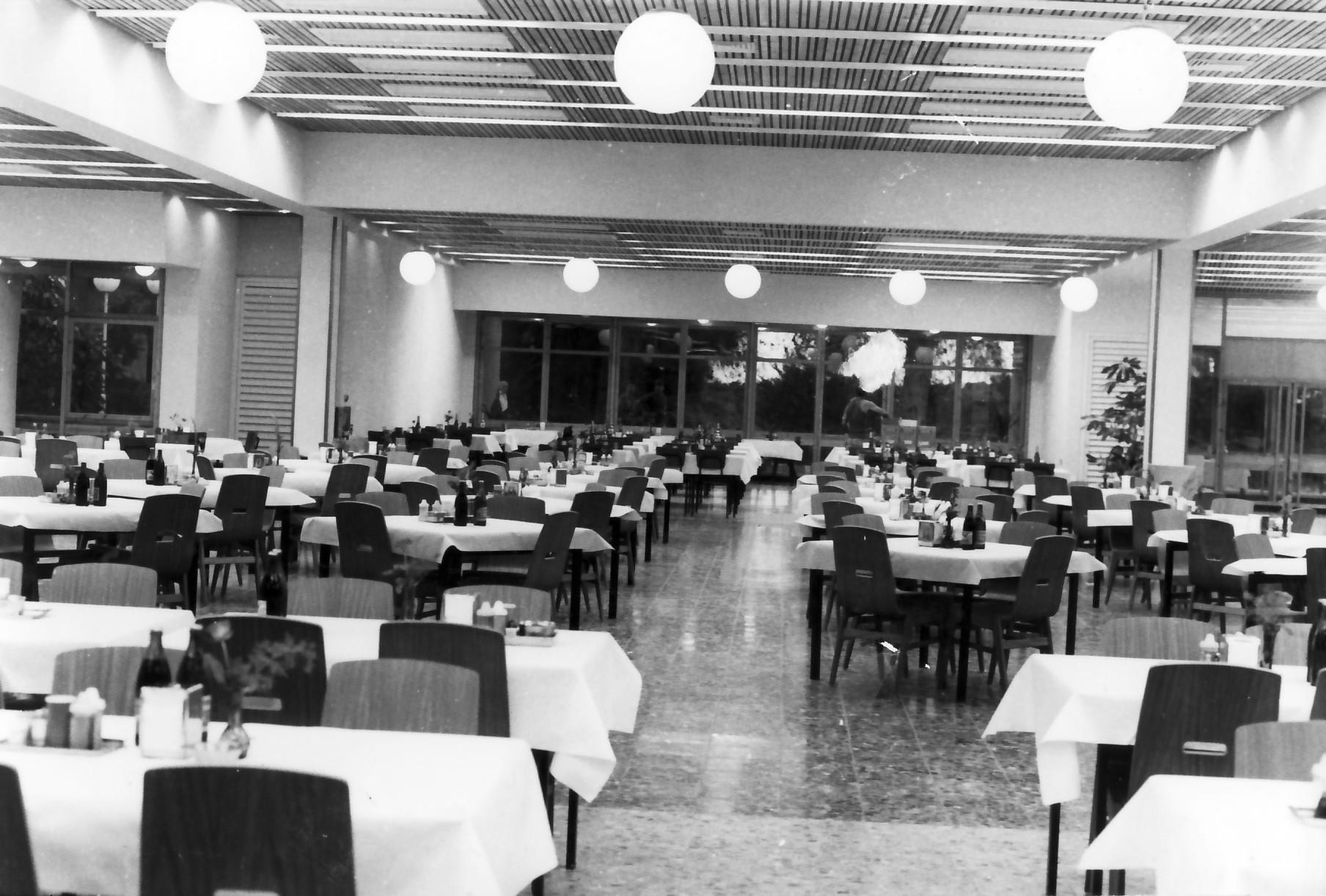 גן-שמואל - חנוכת חדר האכל החדש 1980